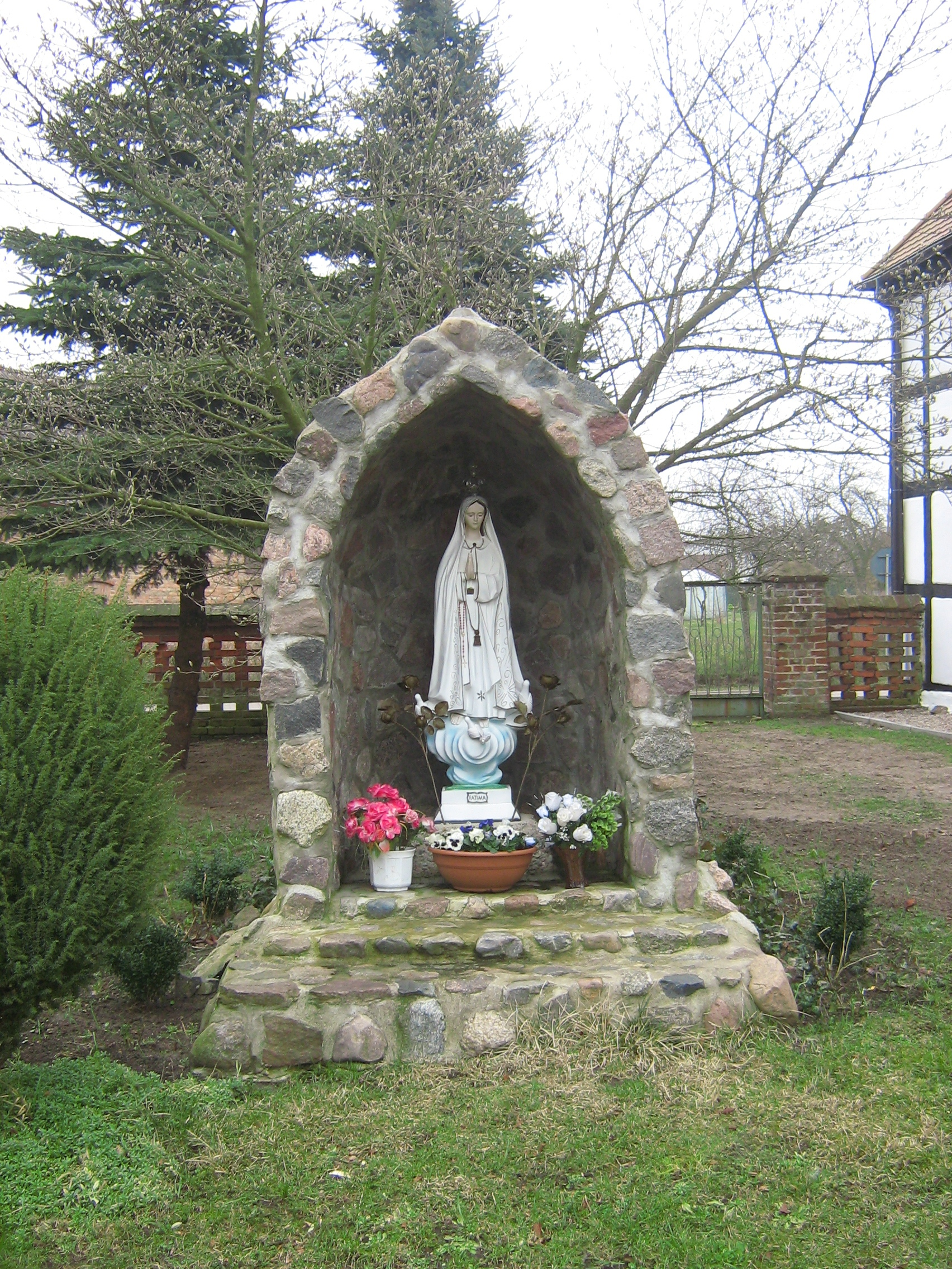 kapliczka przy kościele św. Trójcy w Świerznie